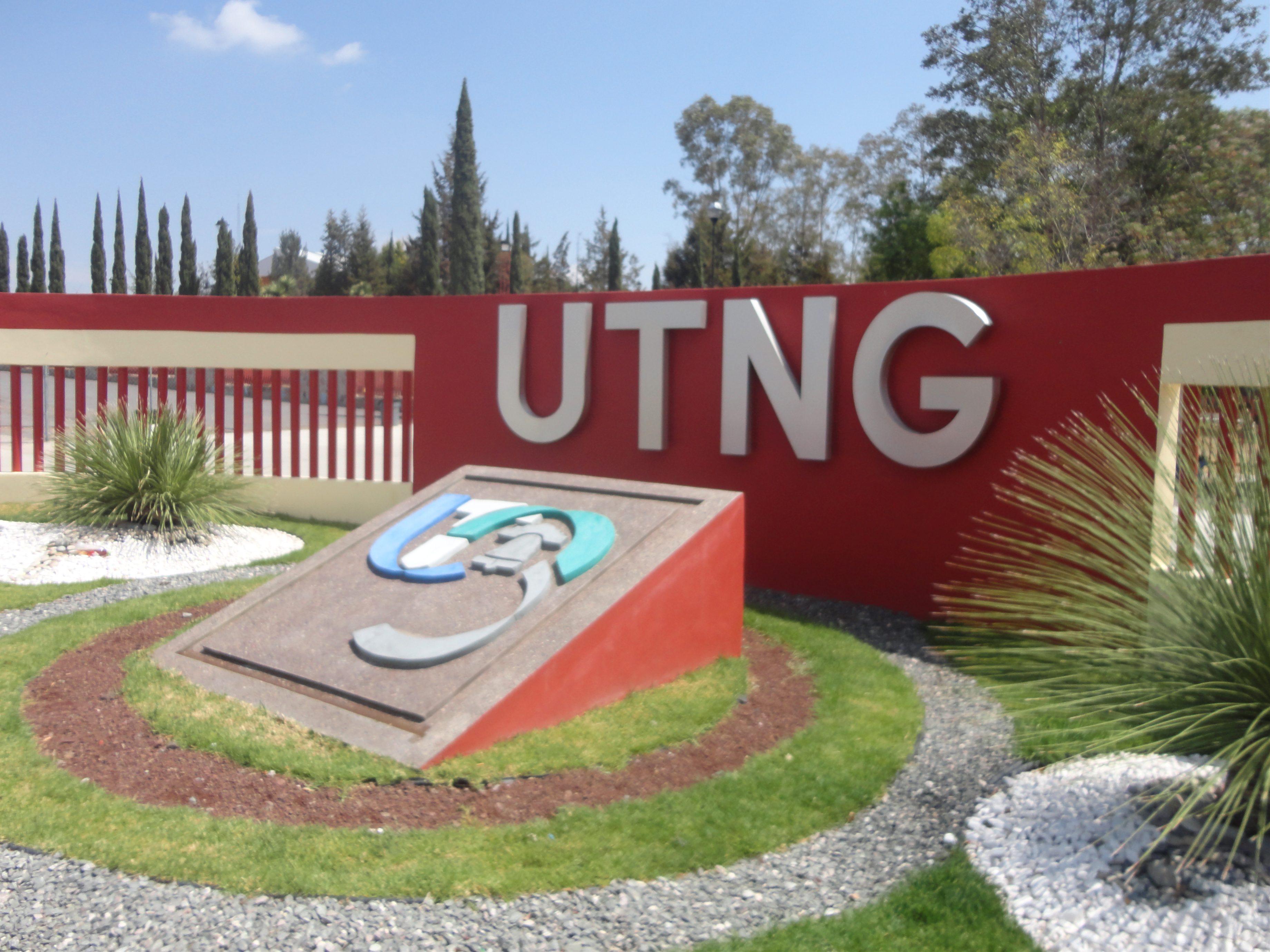 Universidad Tecnologica del Norte de Guanajuato (UTNG), Dolores Hidalgo, Guanajuato, México.